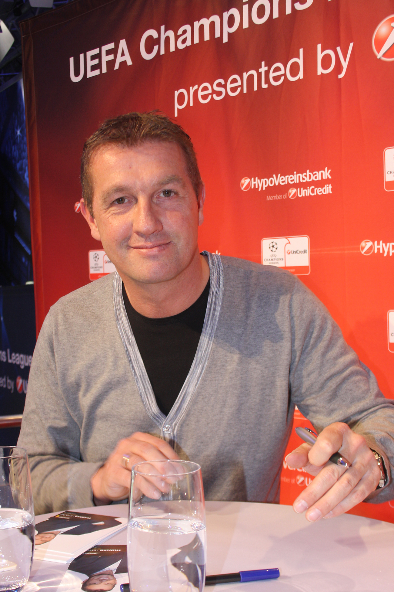 Thomas Strunz, ehemaliger deutscher Fußballspieler/-Manager